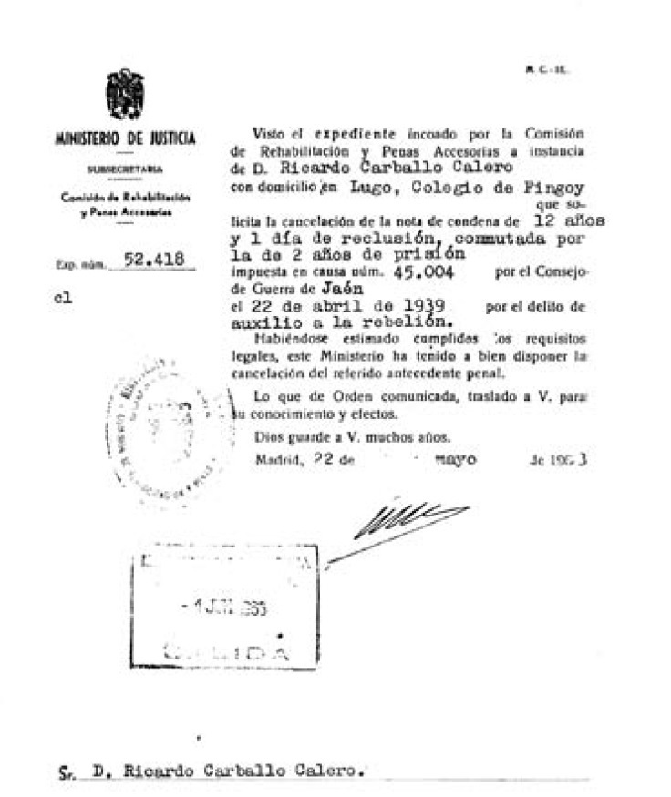 Ricardo Carballo Calero, cancelación de antecedentes penales